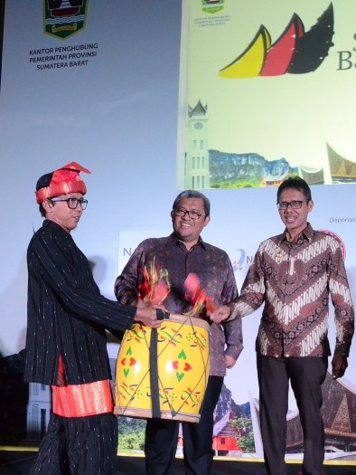 Sumbar Expo 2016 Resmi Digelar